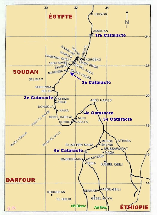 Plan des Cataractes du Nil (Égypte).